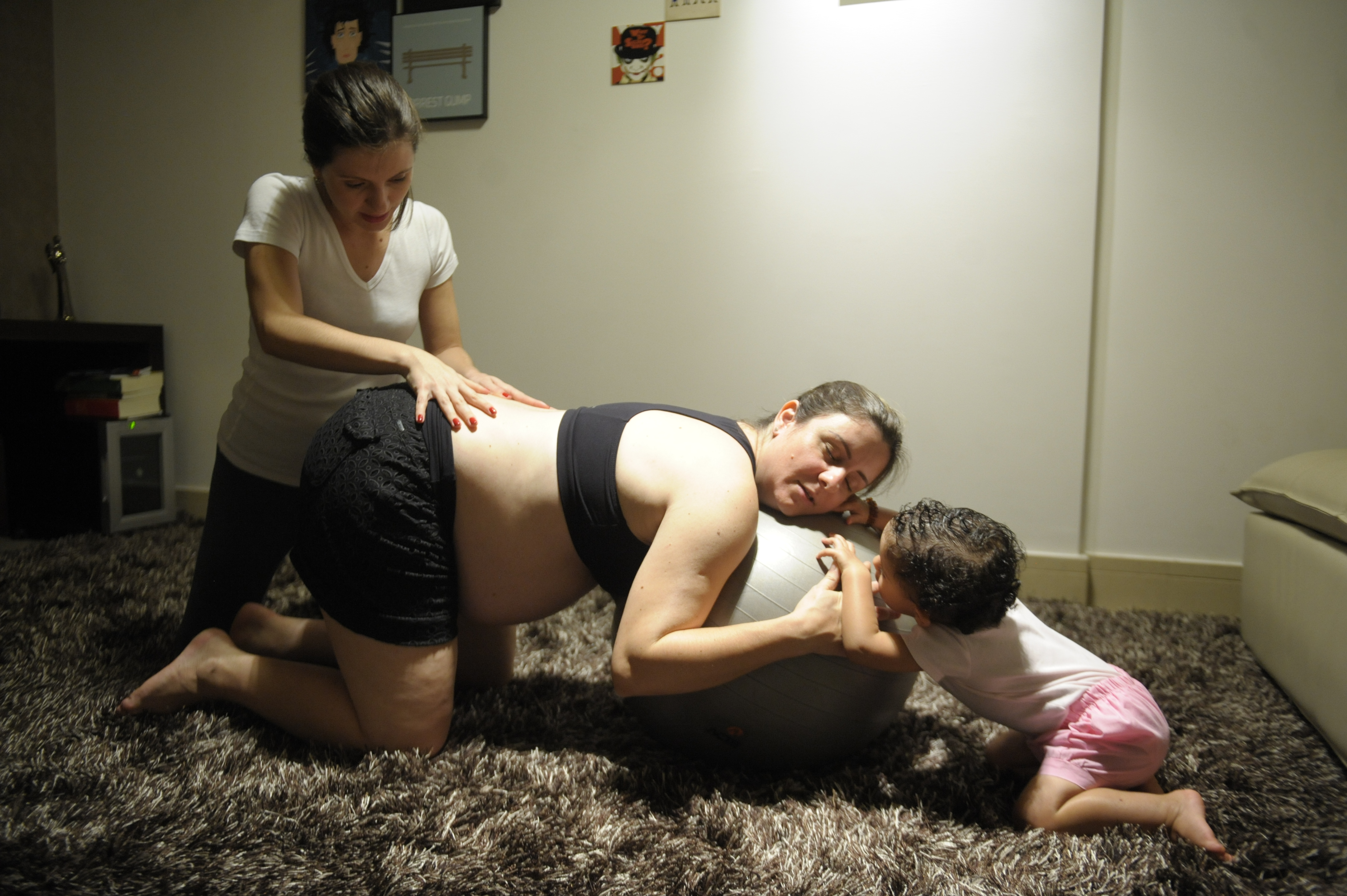 Doulas oferecem orientação, suporte físico e emocional à família na gravidez e no parto. A doula Jéssica Macêdo orienta Luciana Rodovalho sobre posições, exercícios e cuidados que ajudam a gestante a se sentir mais confortável no final da gravidez e aliviam as dores no trabalho de parto, como banho, posição de "cavalinho" e apoio de bola. Foto: Jefferson Rudy/Agência Senado